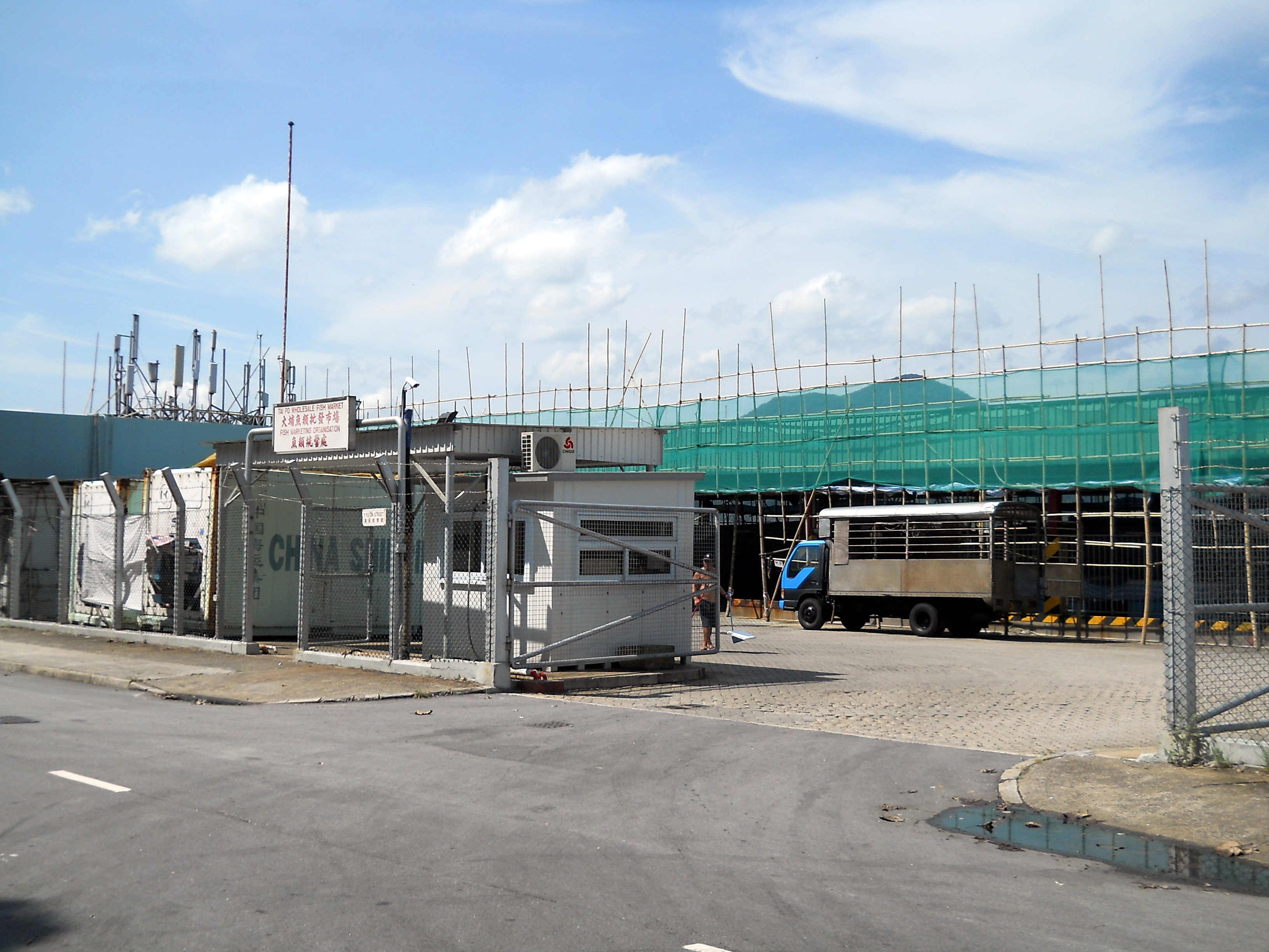 中文（香港）: 大埔魚類批發市場